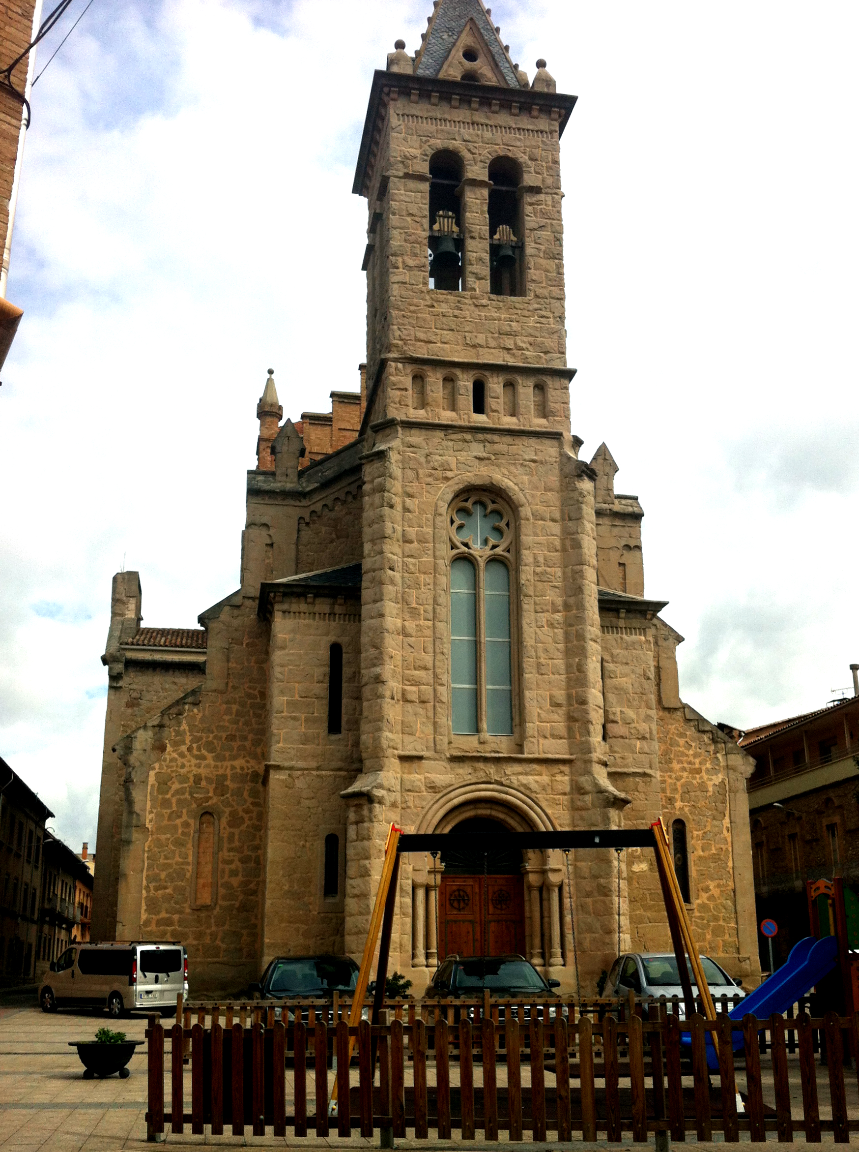 Façana de l'església de Santa Eulàlia de Gironella des de la plaça de l'església